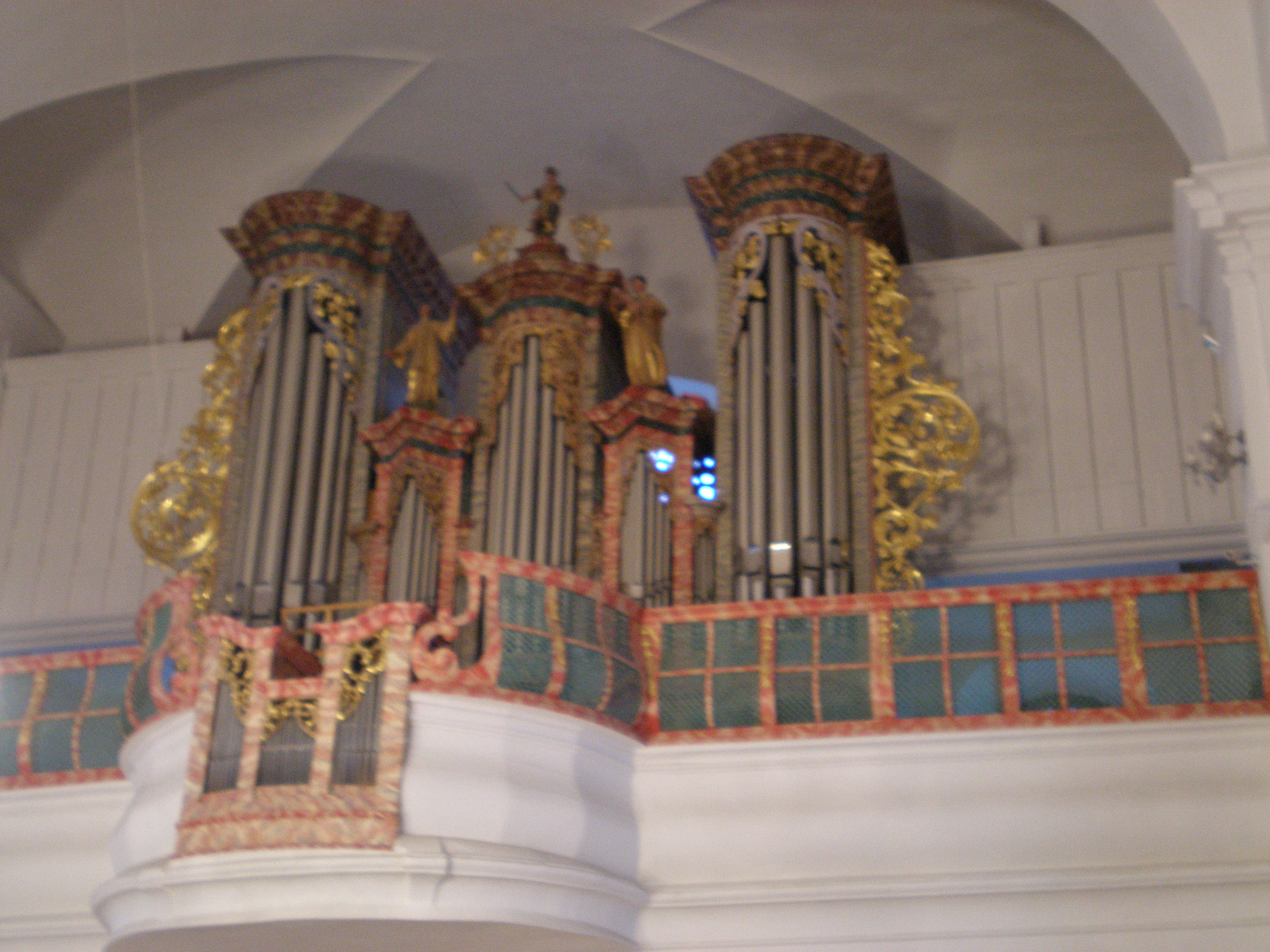 Orgulje varaždinske katedrale